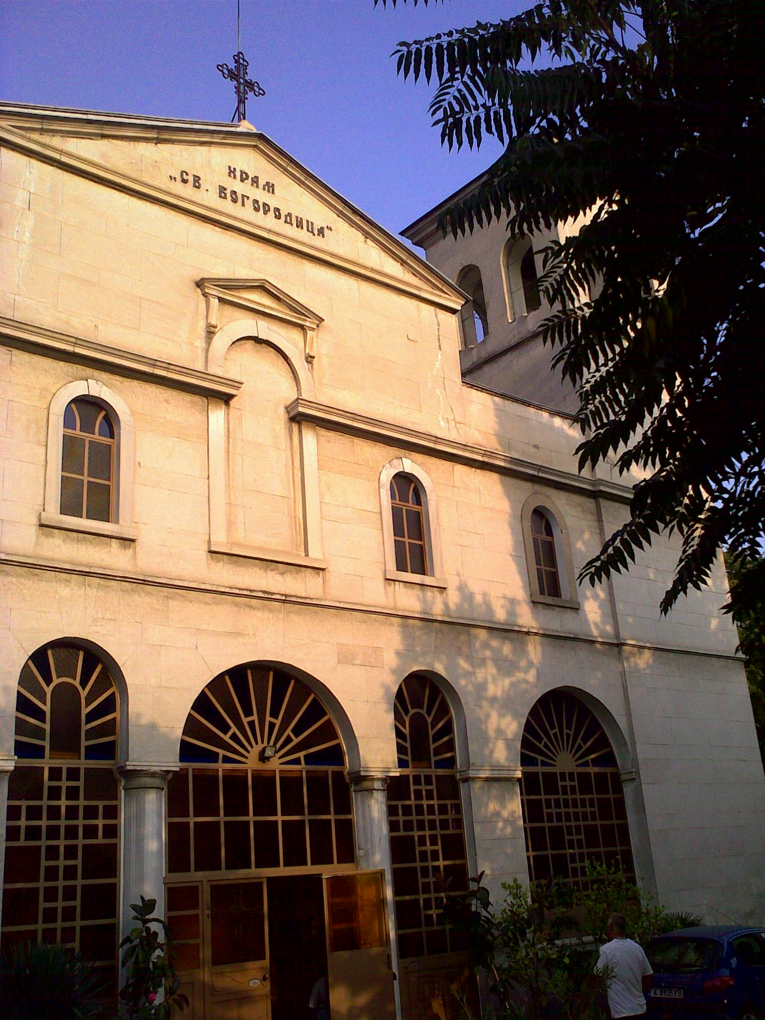 Бургас - Храм "Св. Богородица"